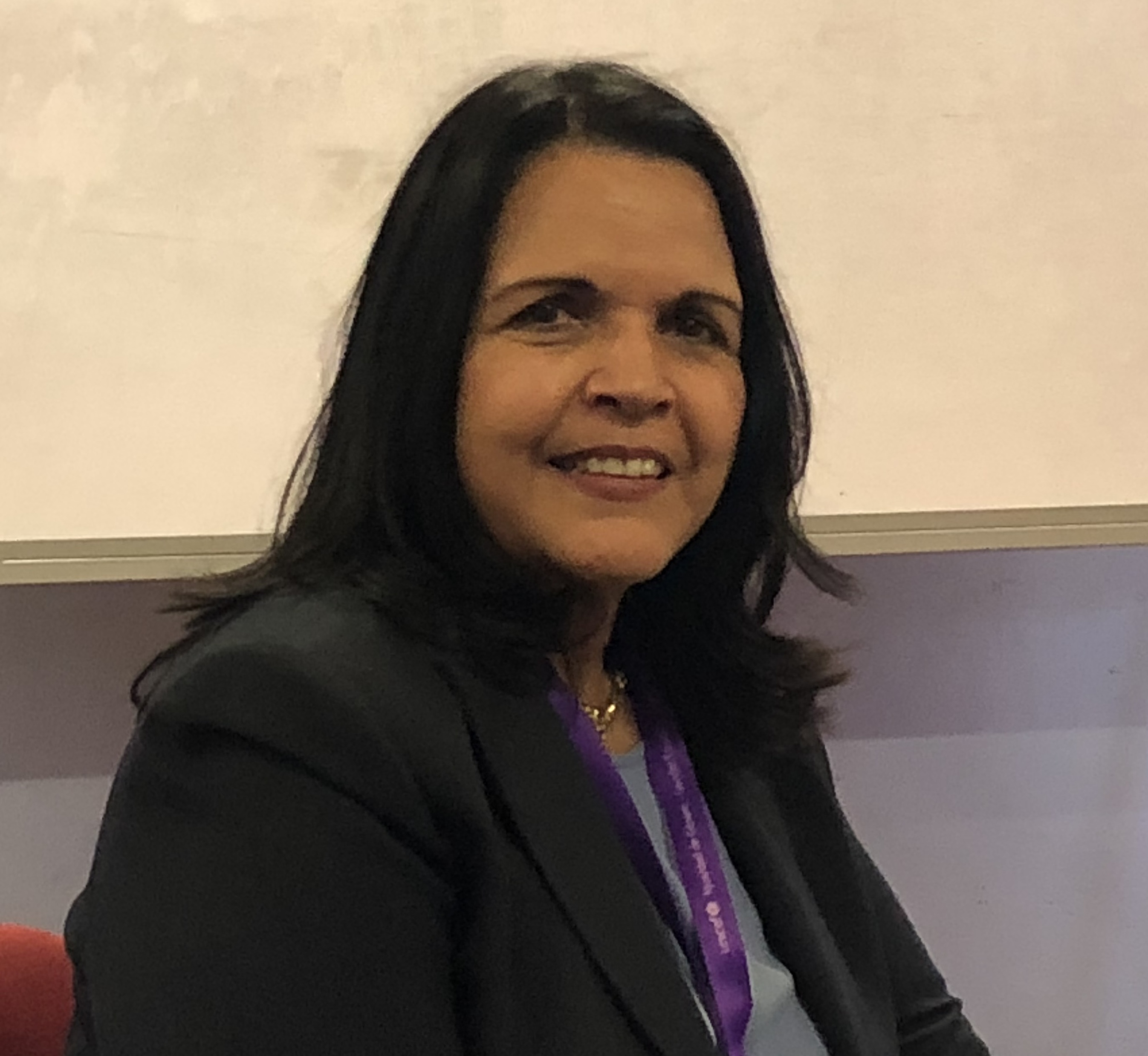 Reunión UNICEF Guatemala